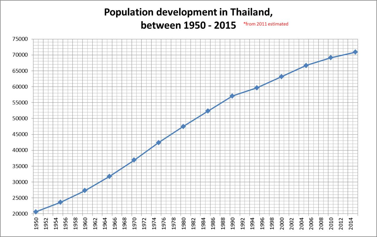 Thailand's population (1950-2015).